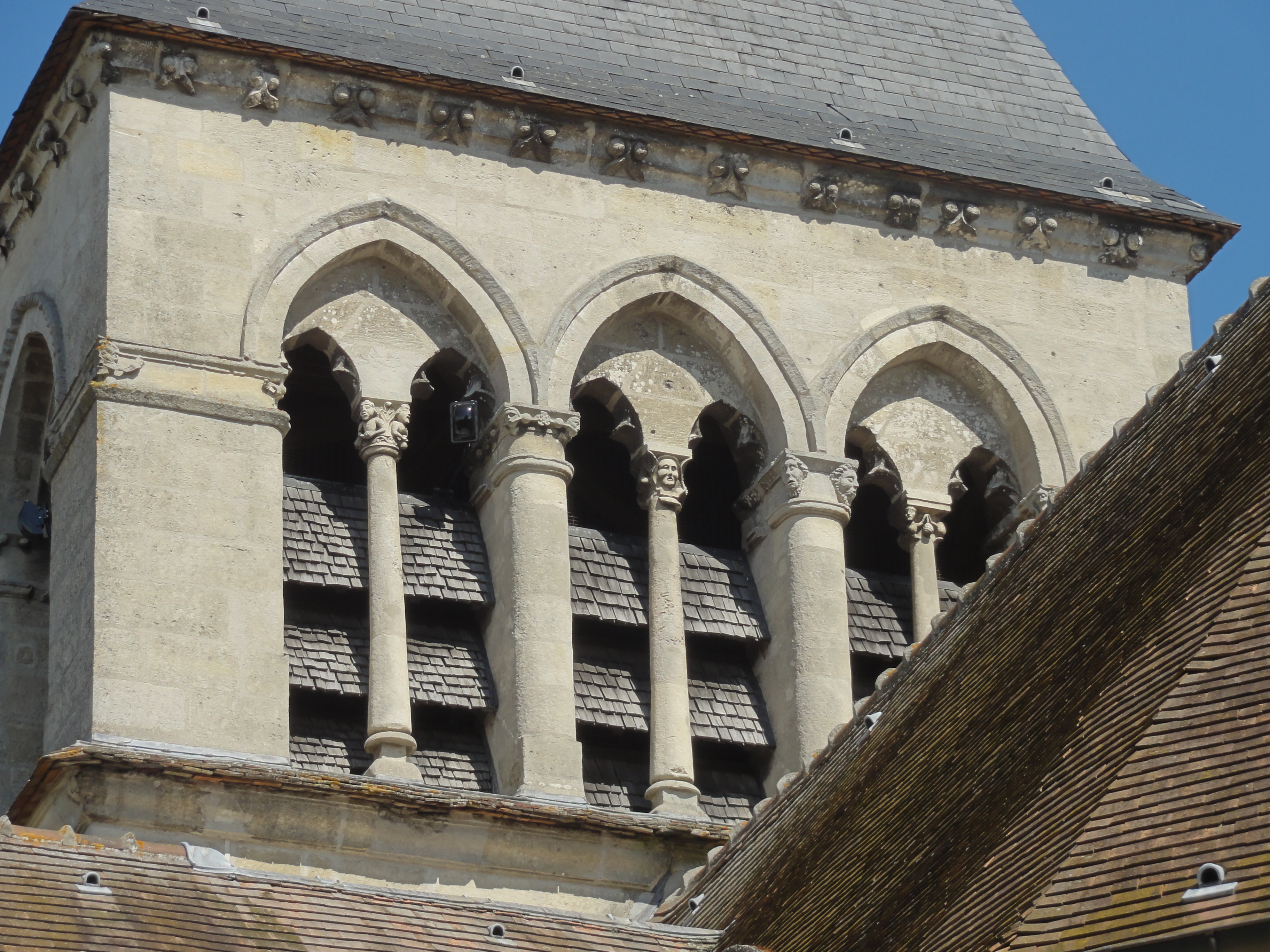 Église Saint-Étienne de Clairoix (voir titre).